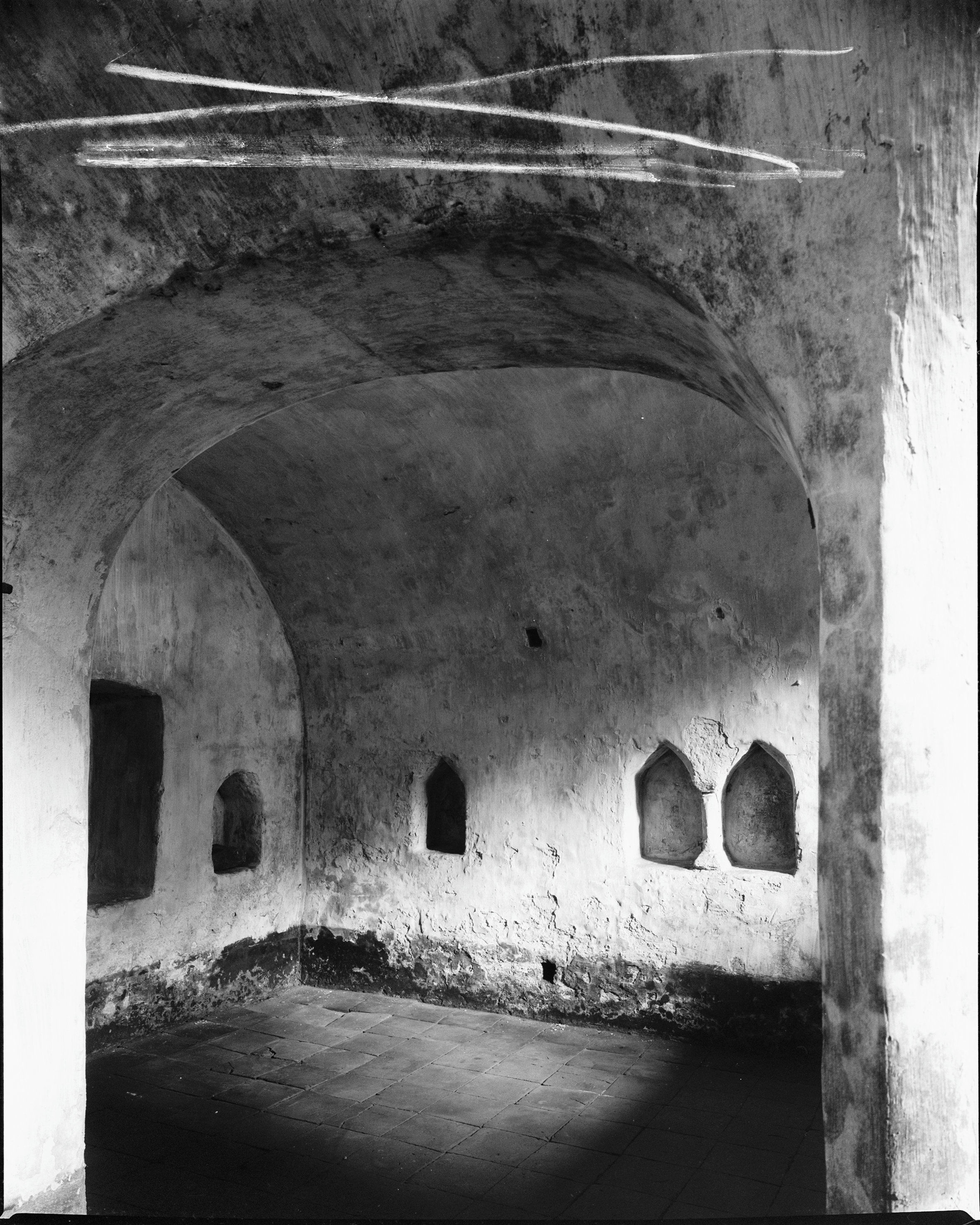 Nederlands Hervormde Kerk: Nederlands Hervormde pastorie, middeleeuwse kelder